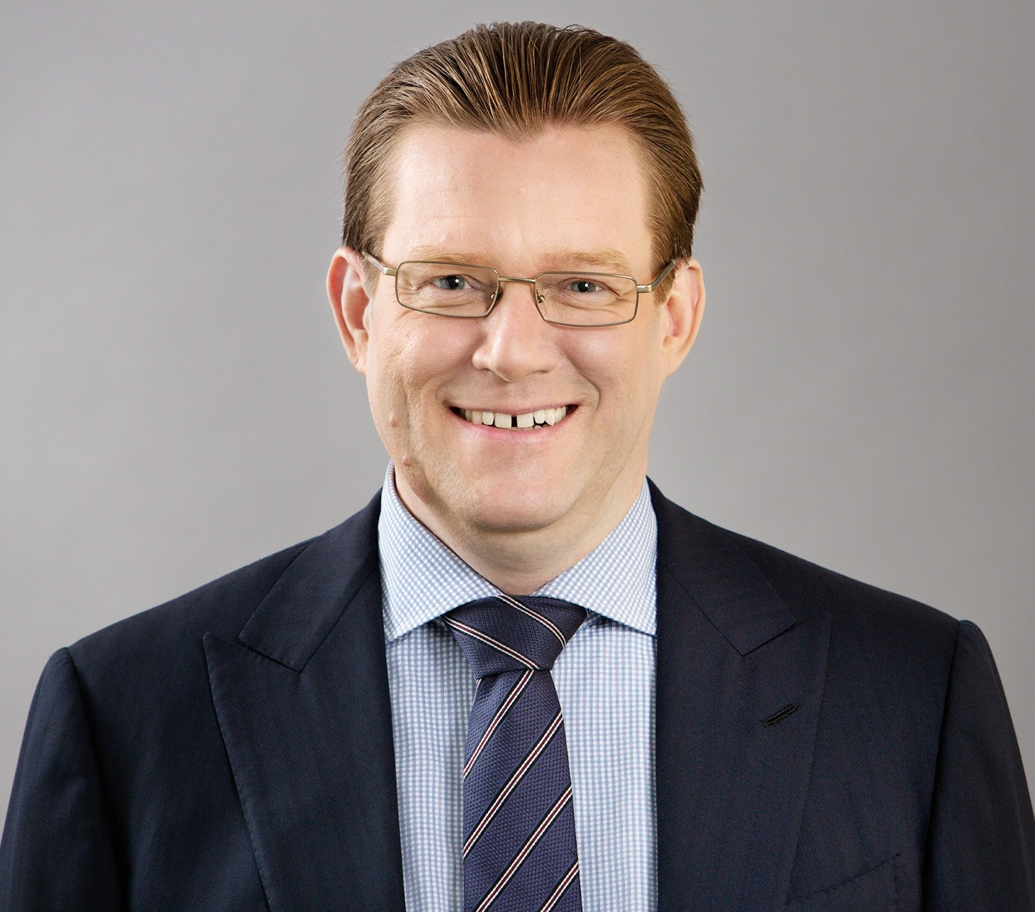 Dr. Josef Wiederkehr, Zürcher CVP-Kantonsrat und Nationalratskandidat (2015)